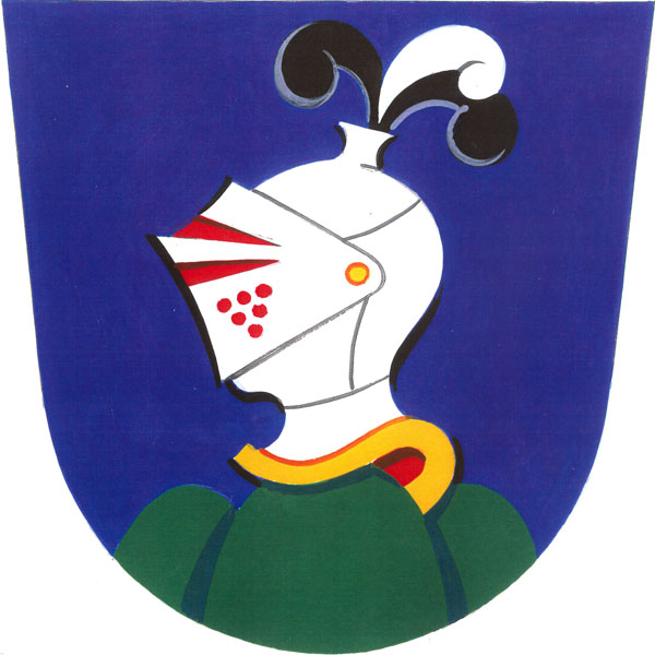 Znak obce Nadějov